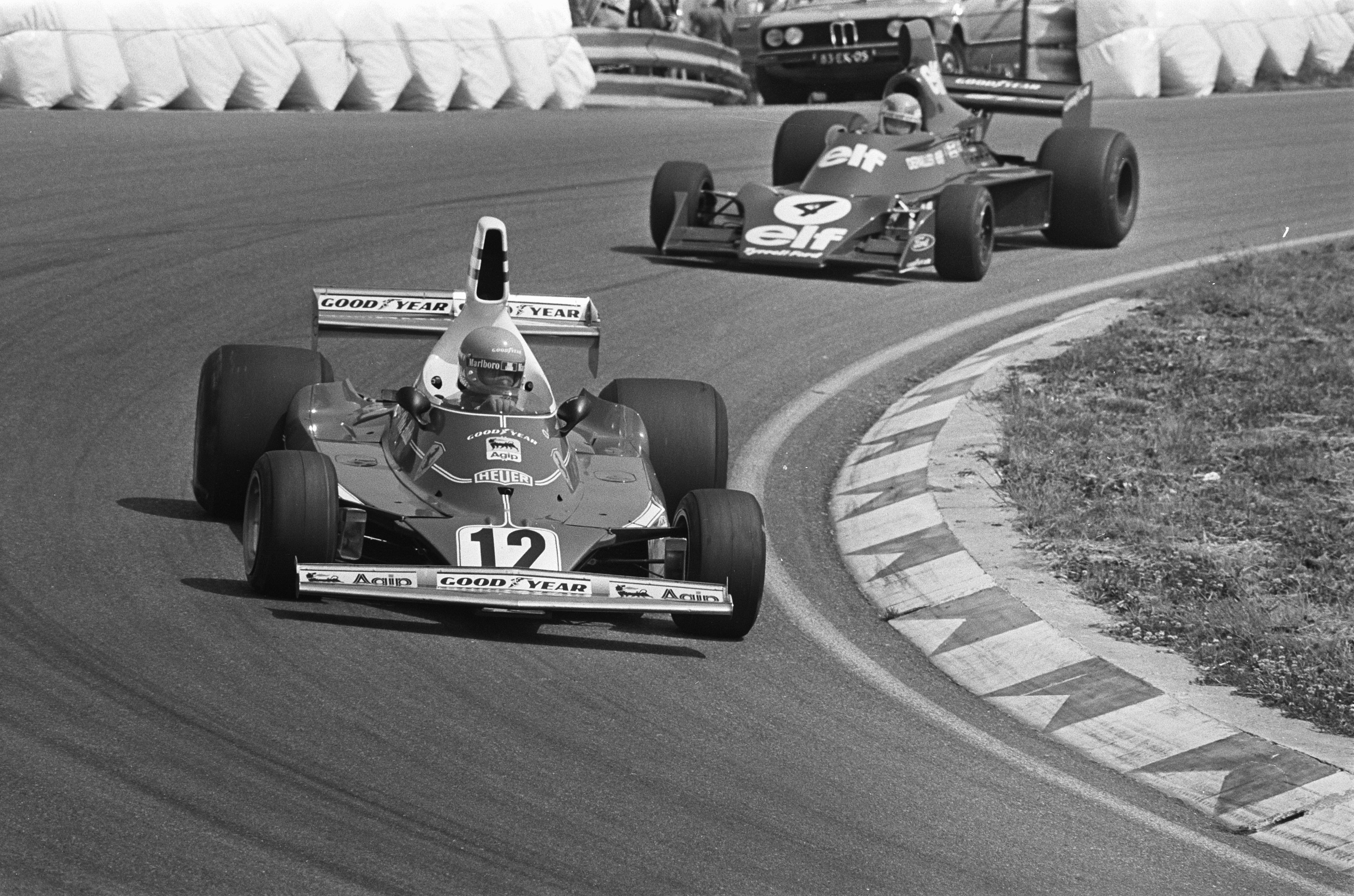 Niki Lauda (12), Patrick Depailler (4) en Emerson Fittipaldi (1) tijdens de training.